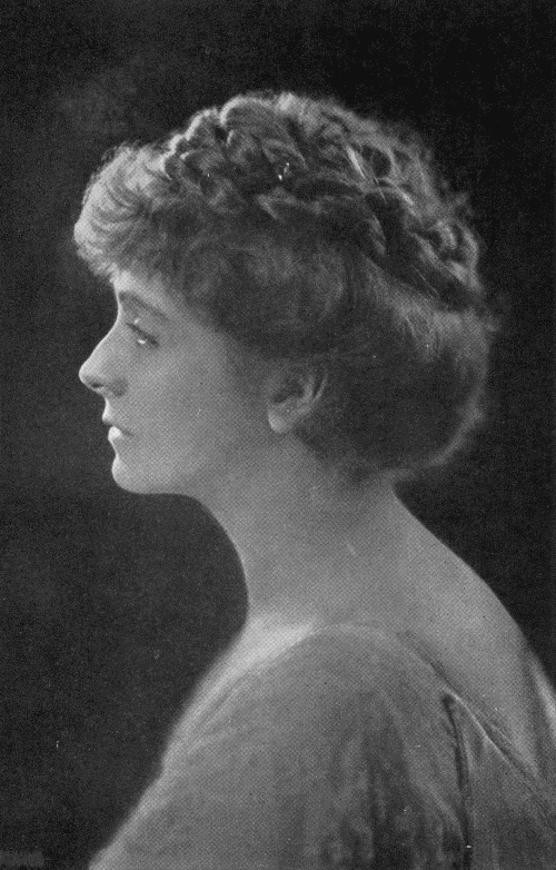 Maude Adams